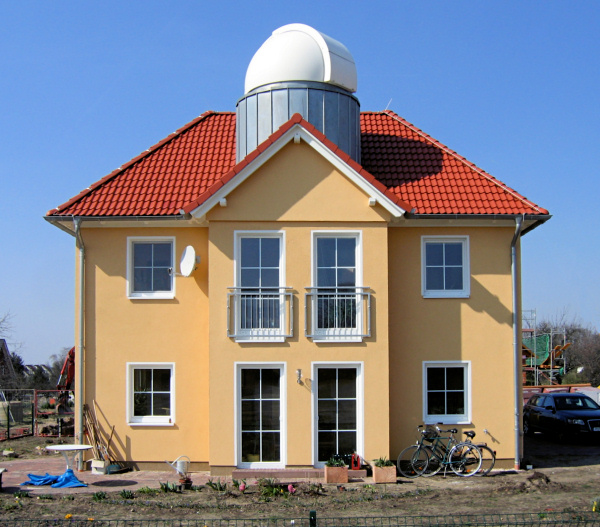 Einfamilienhaus mit Sternwarte, Inastars Observatory Potsdam B15